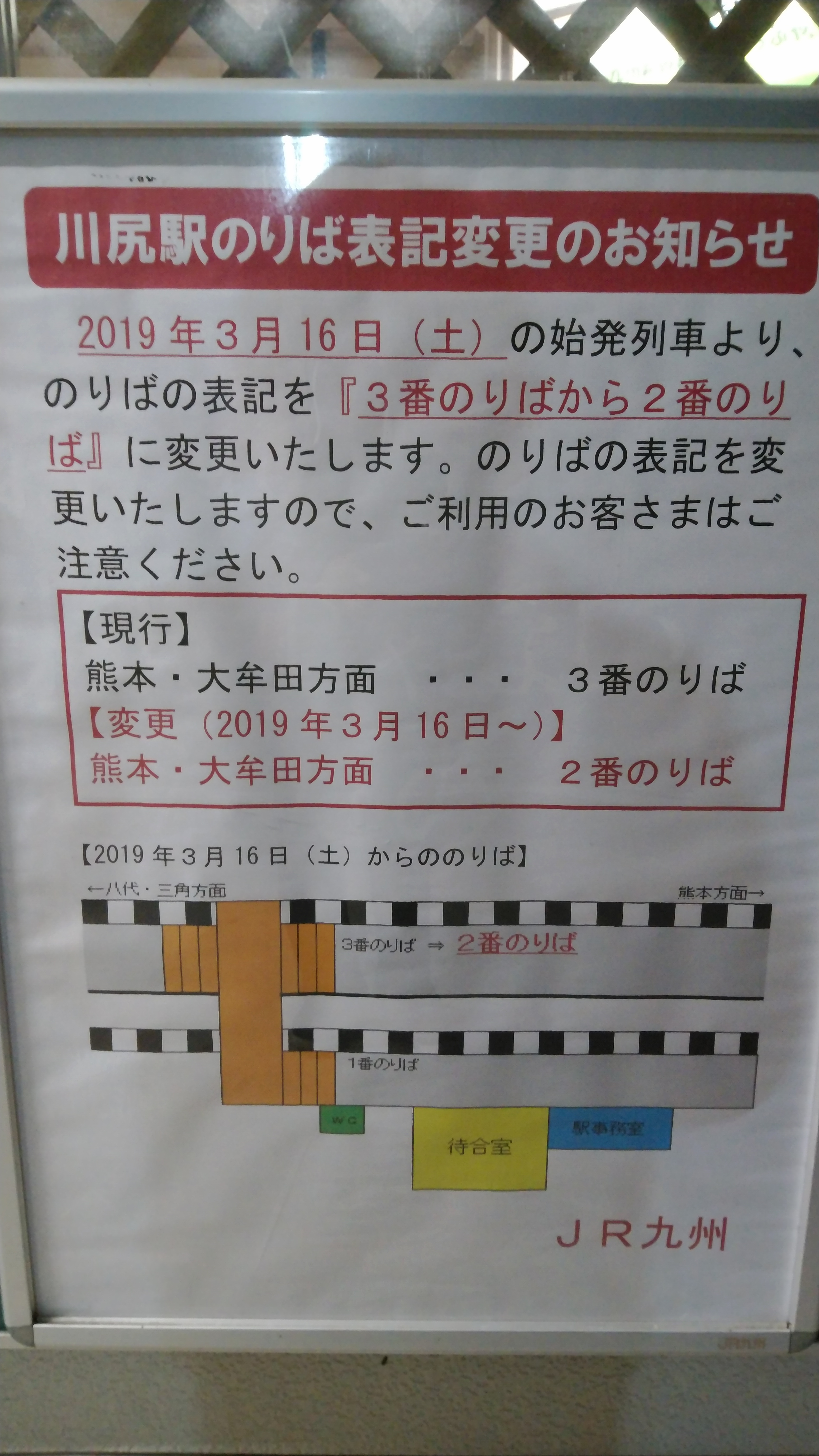 川尻駅構内、のりば変更案内表示